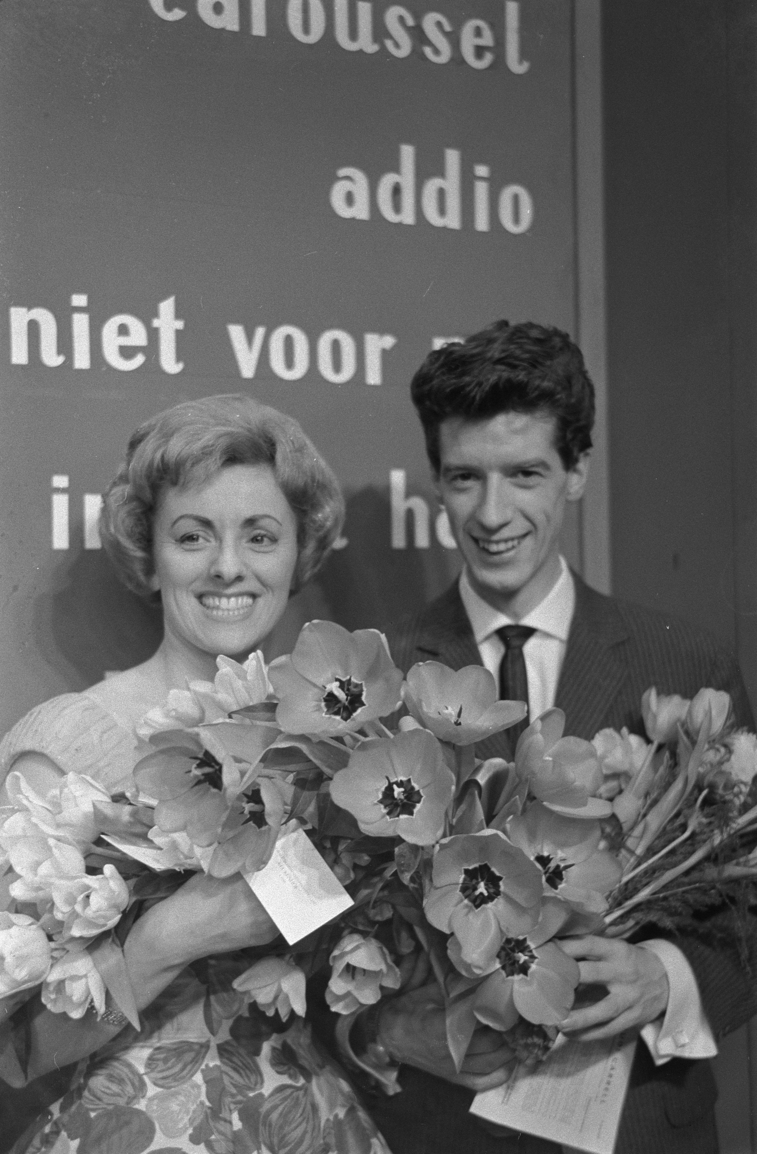 Collectie / Archief : Fotocollectie Anefo Reportage / Serie : [ onbekend ] Beschrijving : Finale van het Nationaal Songfestival 1960 in Hilversum, winnaar Rudy Carrell met Annie Palmen Datum : 9 februari 1960 Locatie : Hilversum Trefwoorden : artiesten, muziek, songfestivals Persoonsnaam : Carrell Rudy, Palmen, Annie Fotograaf : Pot, Harry / Anefo Auteursrechthebbende : Nationaal Archief Materiaalsoort : Negatief (zwart/wit) Nummer archiefinventaris : bekijk toegang 2.24.01.05 Bestanddeelnummer : 911-0171